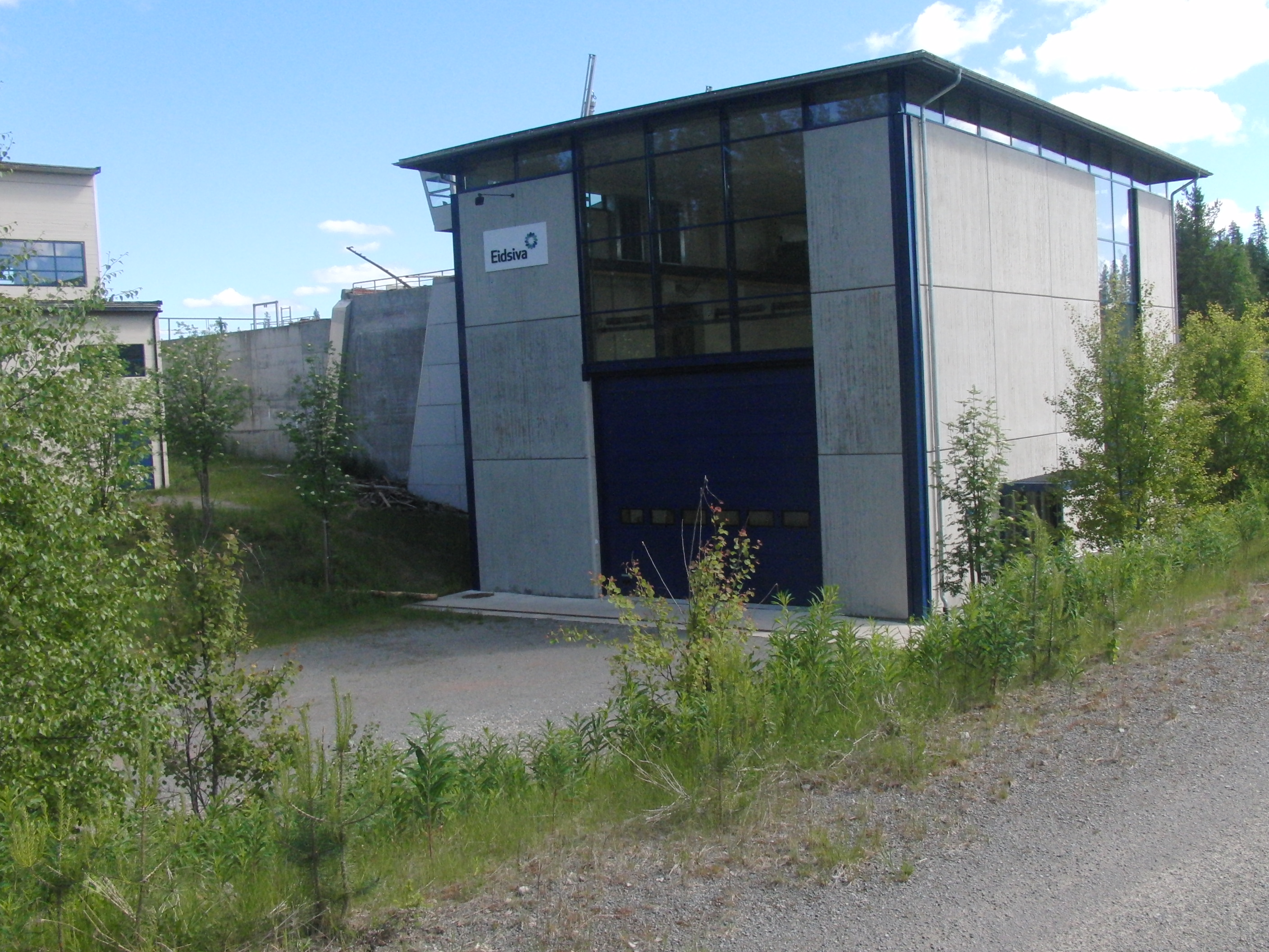 Sagnfossen kraftverk